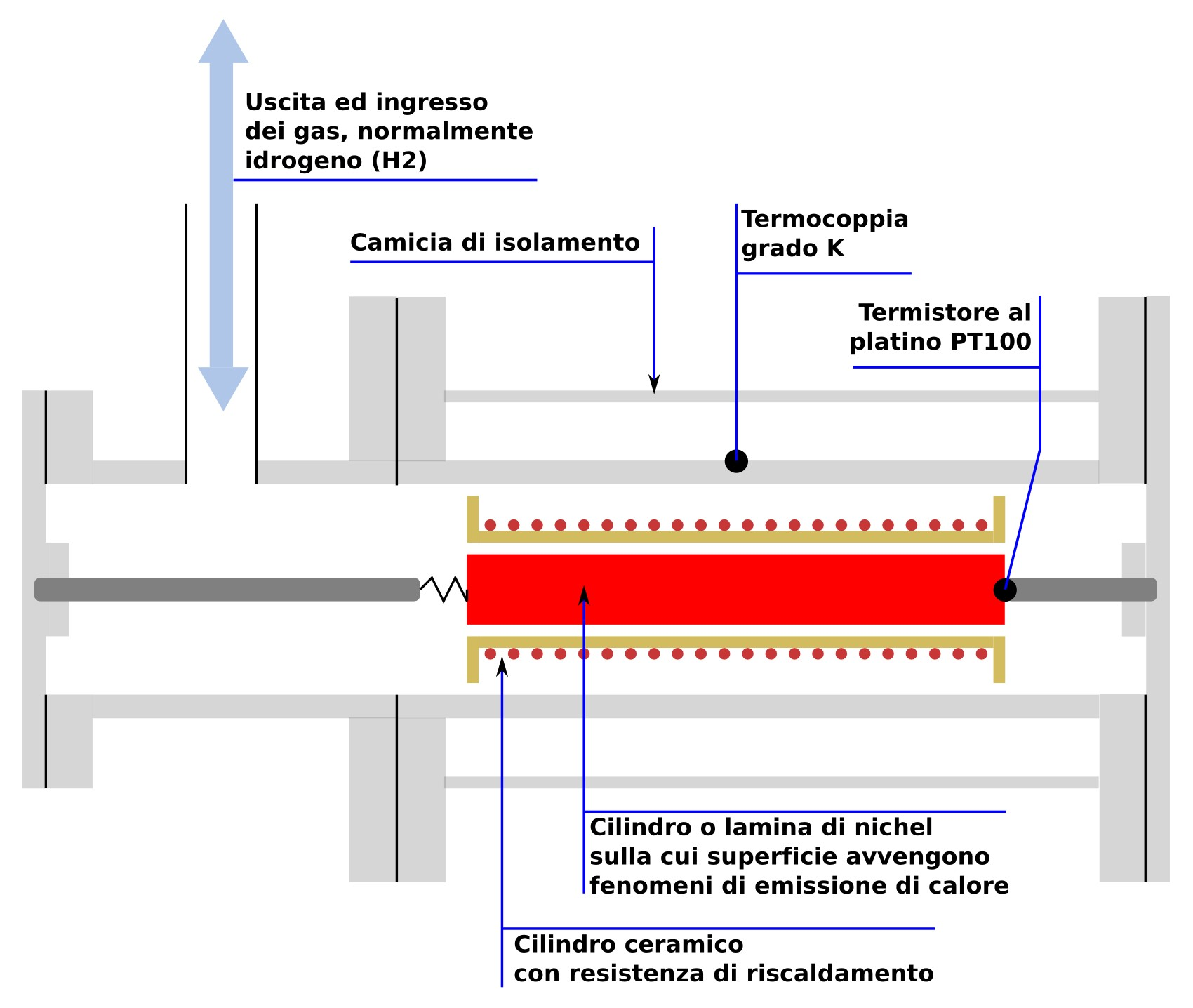 Schema della cella di Piantelli-Focardi, per il test del nichel in atmosfera di idrogeno per reazioni di fusione Fredda (LENR).